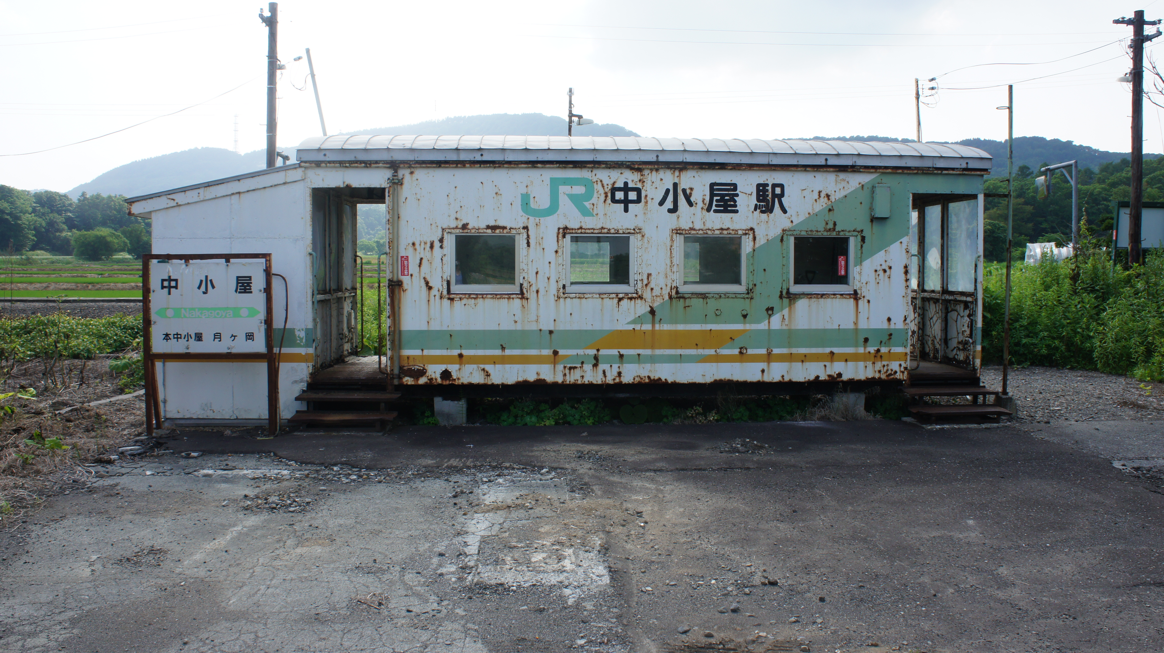 JR札沼線・中小屋駅の駅舎 Sony NEX-3